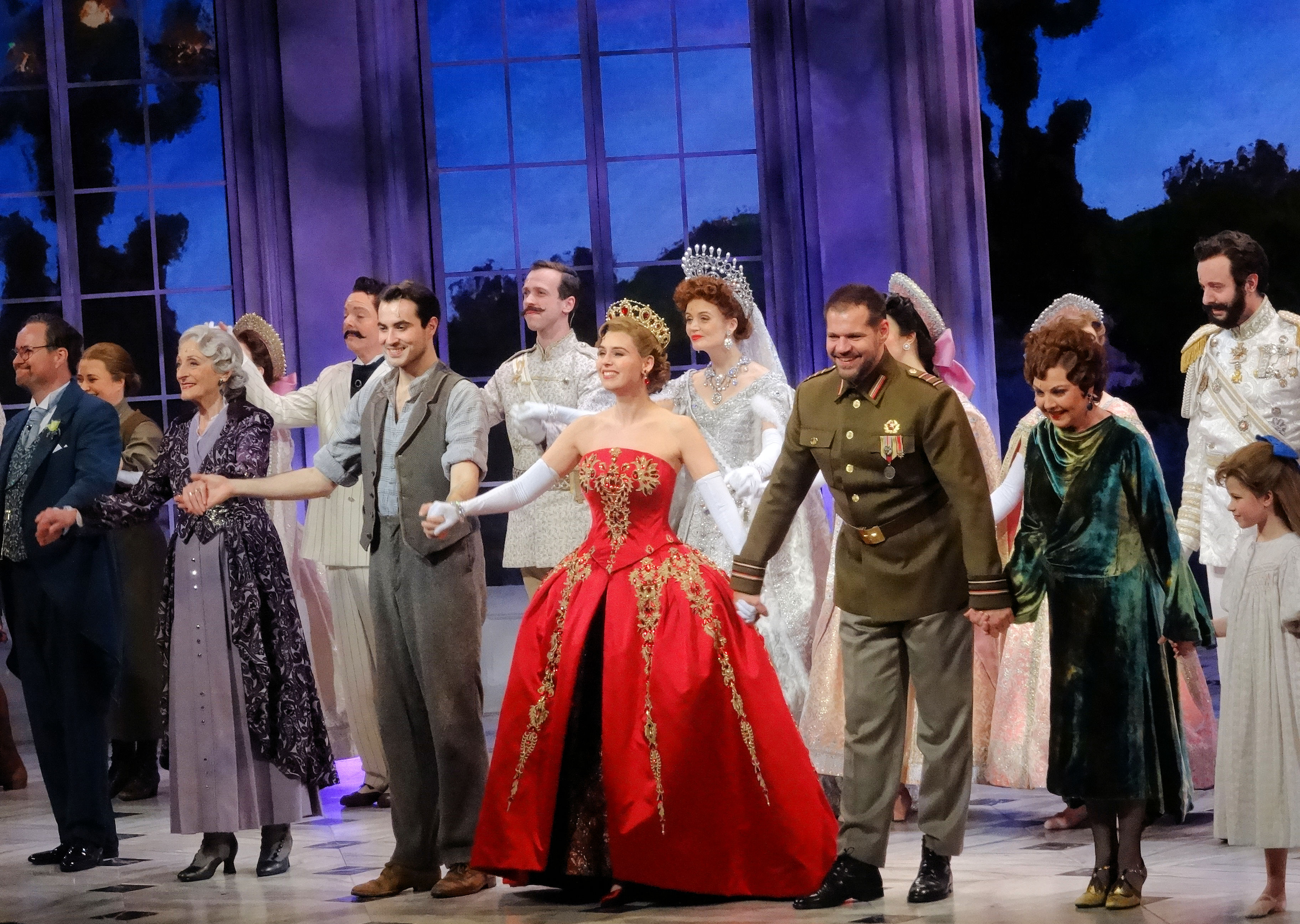 Anastasia (Circustheater, 2020)